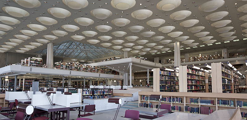 Lesesaal der Staatsbibliothek zu Berlin (Haus 2, Potsdamer Strasse) von Hans Scharoun